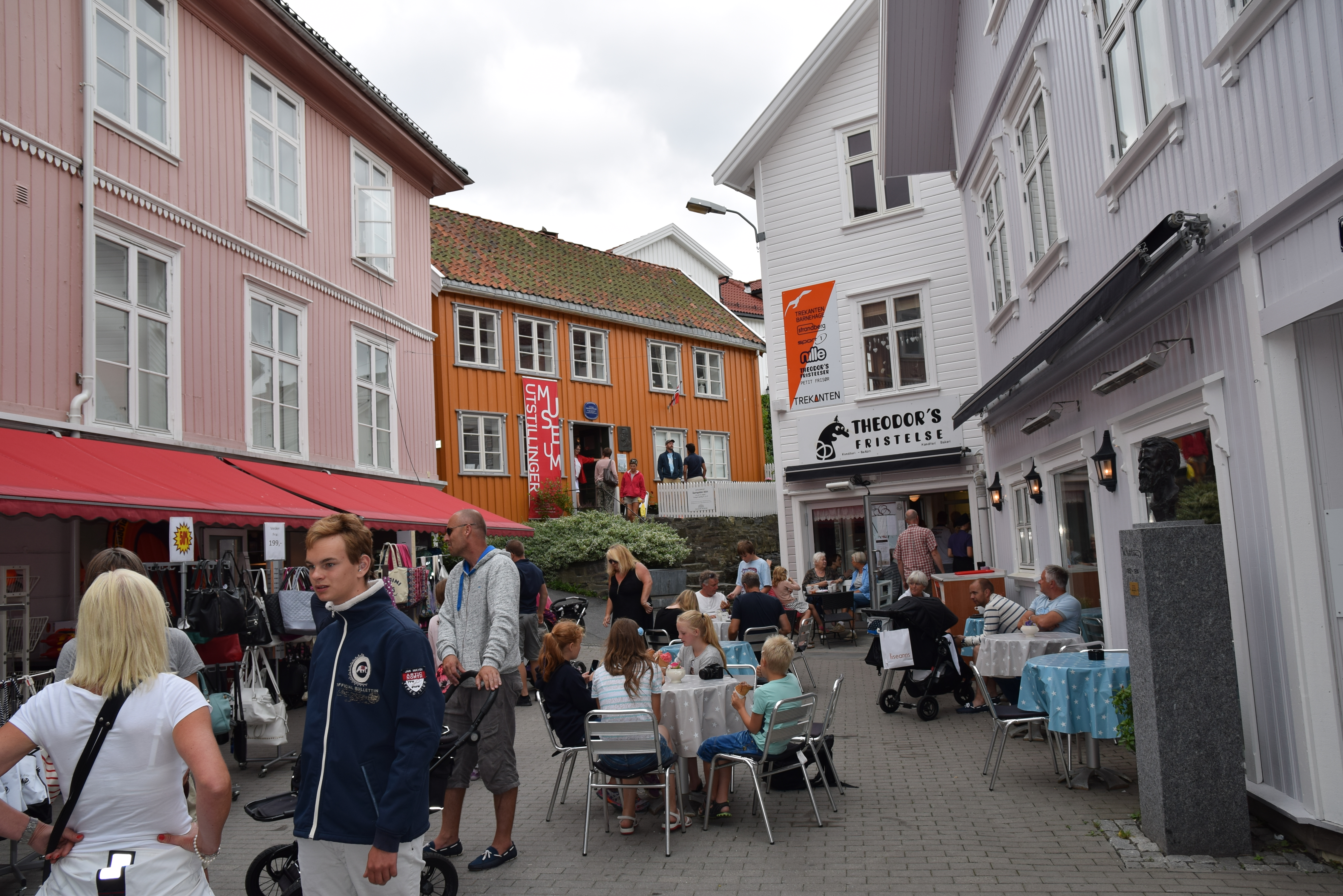 Theodor Kittelsens plass, Kragerø. Det gule huset er Kittelsenhuset, del av Telemark Museum.